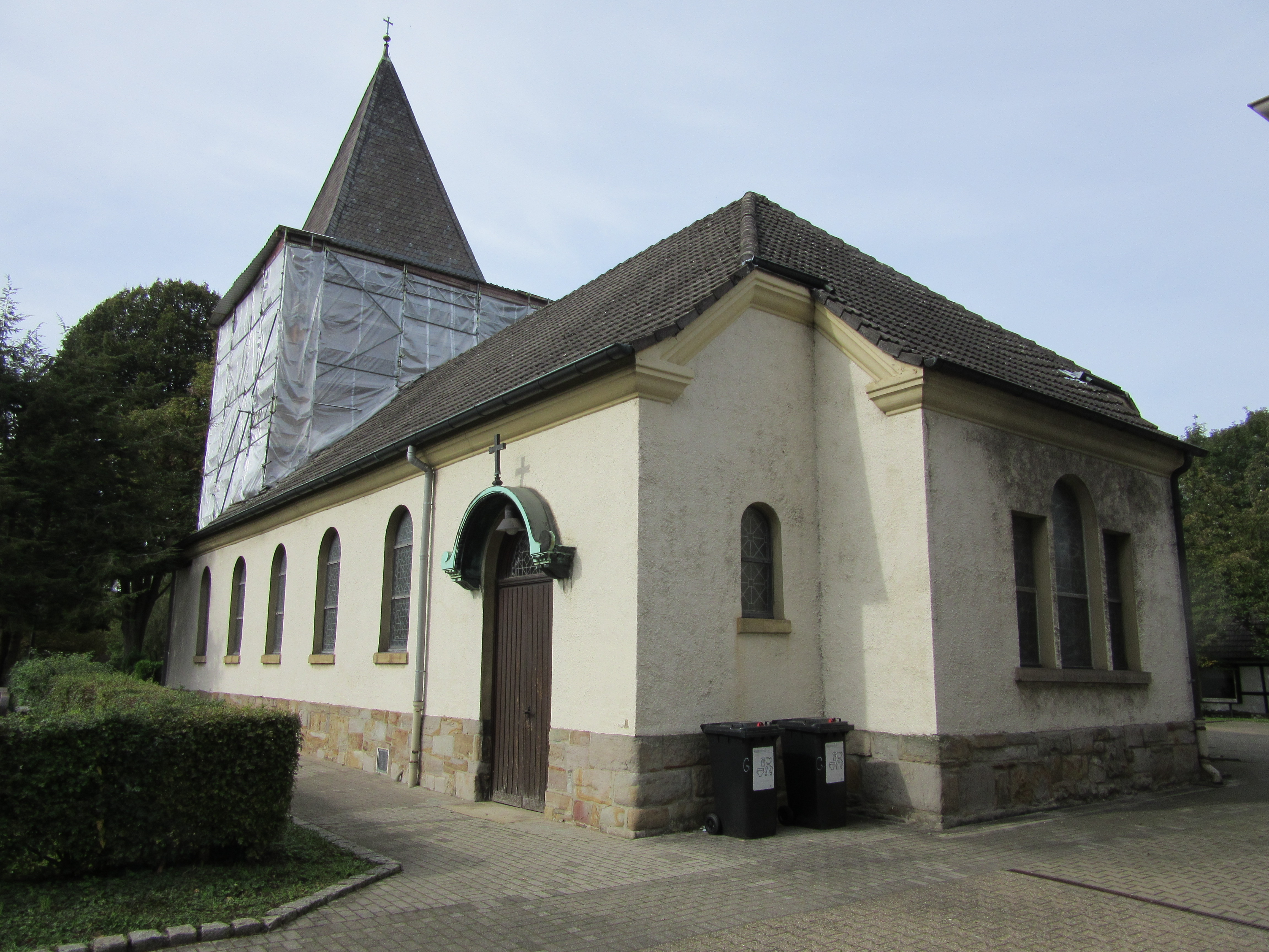 Evangelische Kirche Lindenhorst, Alte Ellinghauser Straße 7, Dortmund. Der historische Kirchturm ist leider baufällig und daher eingerüstet. Zur Zeit fehlt das Geld für eine Restaurierung. This is a photograph of an architectural monument. 0280